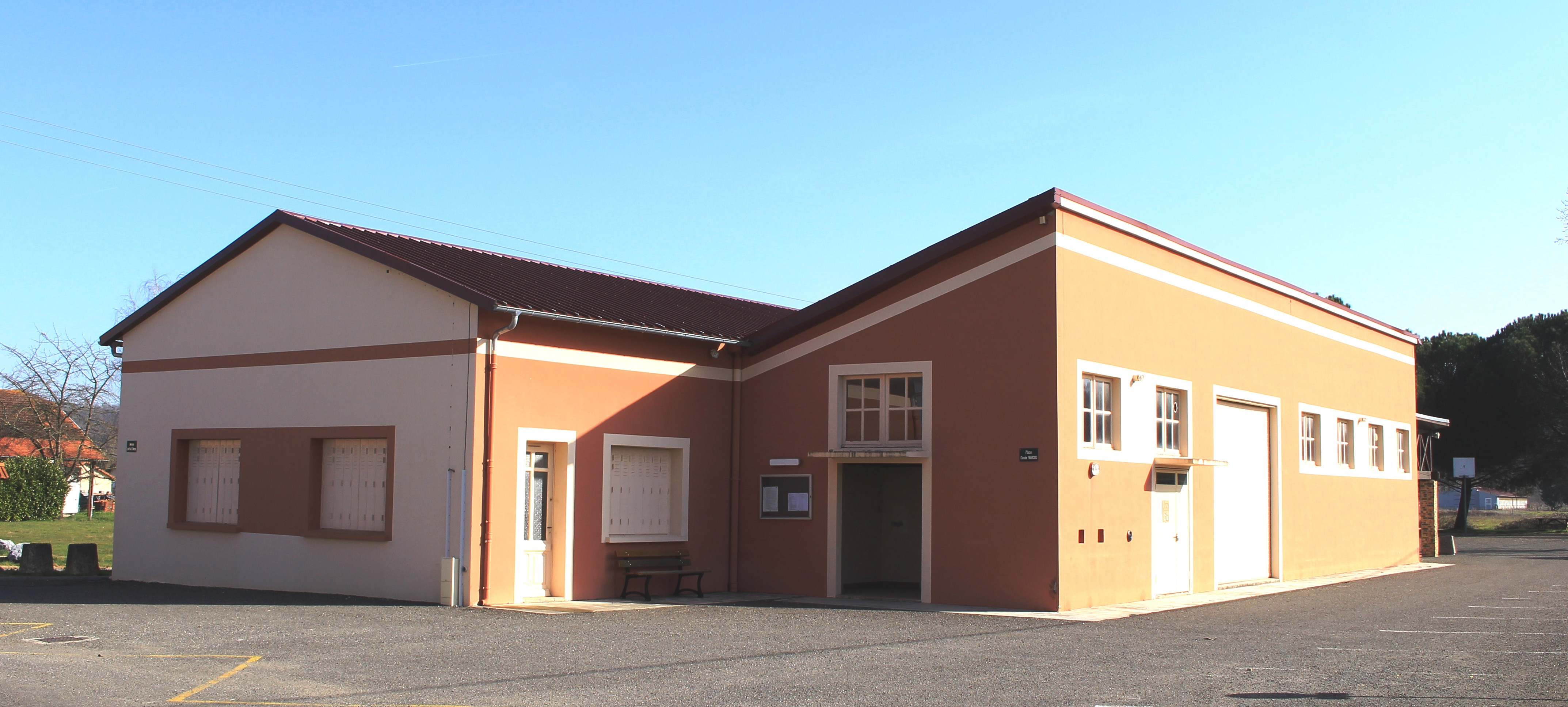 Salle des fêtes de Laméac (Hautes-Pyrénées)